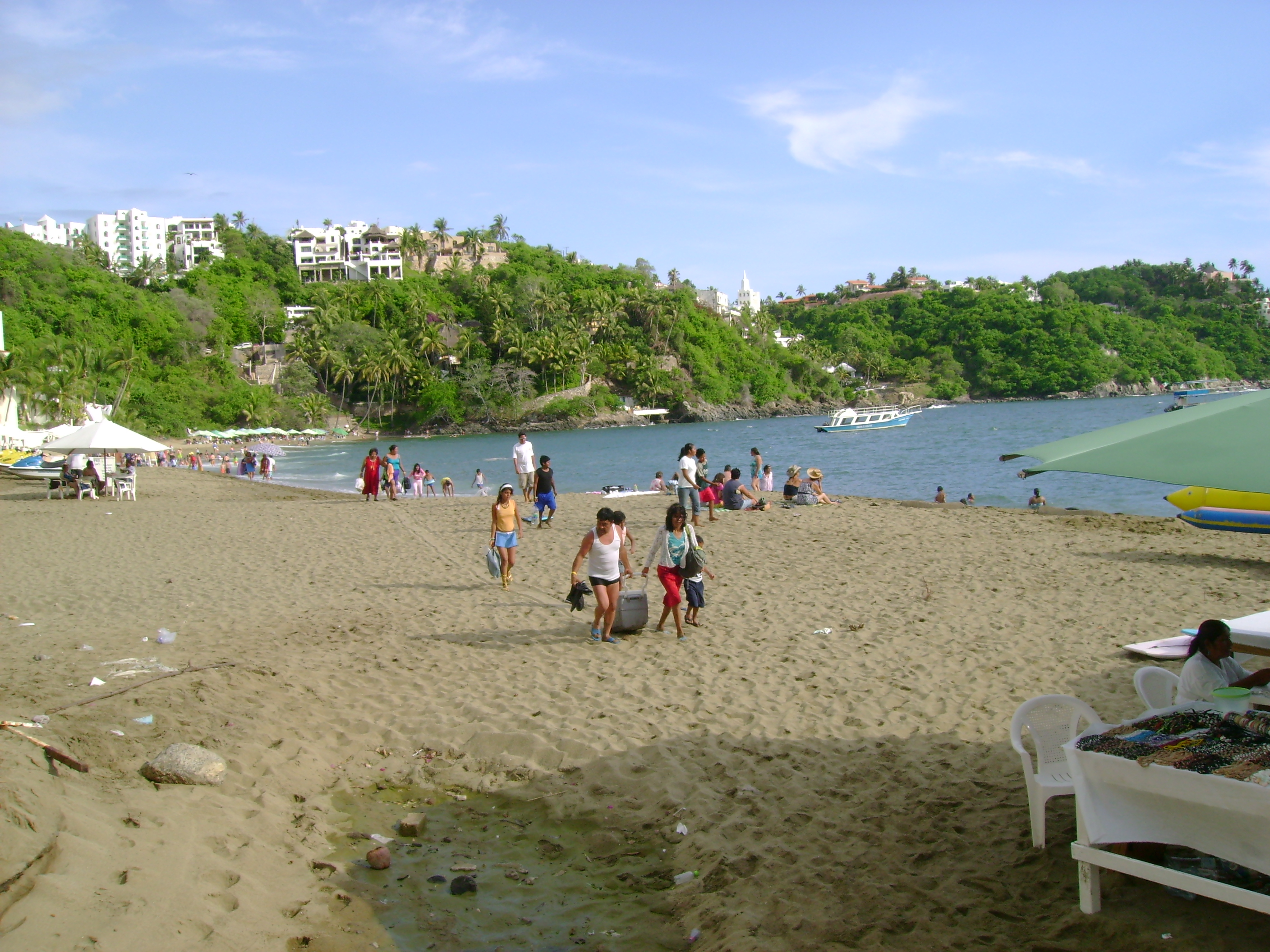 Vista desde la arena de la Playa La Audiencia